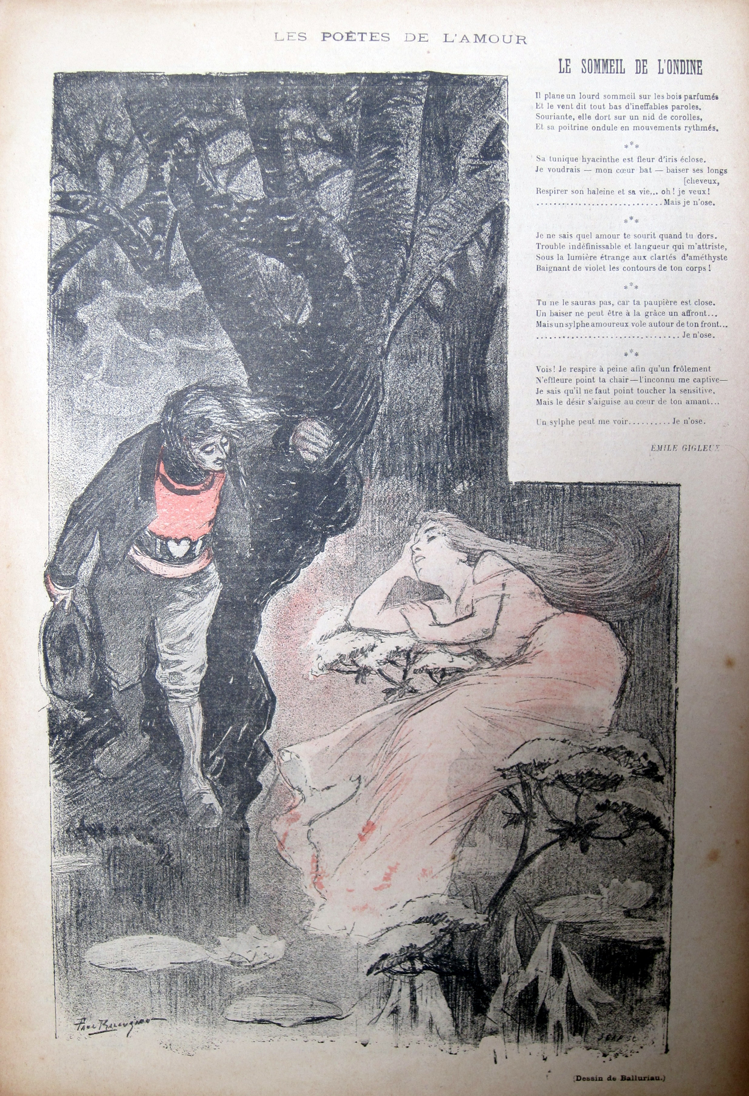 Le Sommeil de l'Ondine par Emile Gigleux (dessin de Balluriau) - revue Gil Blas illustré du 13 janvier 1895